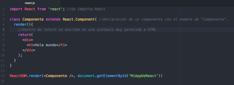 Archivo de Javascript que tiene un ejemplo pequeño de un componente de React.js